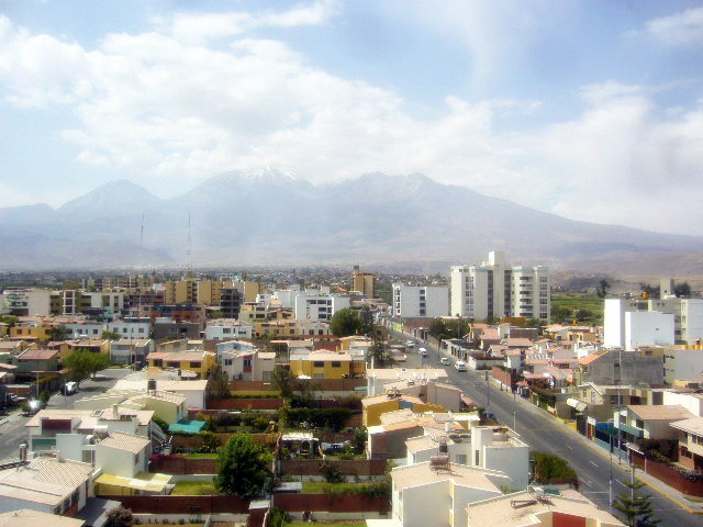 Cayma